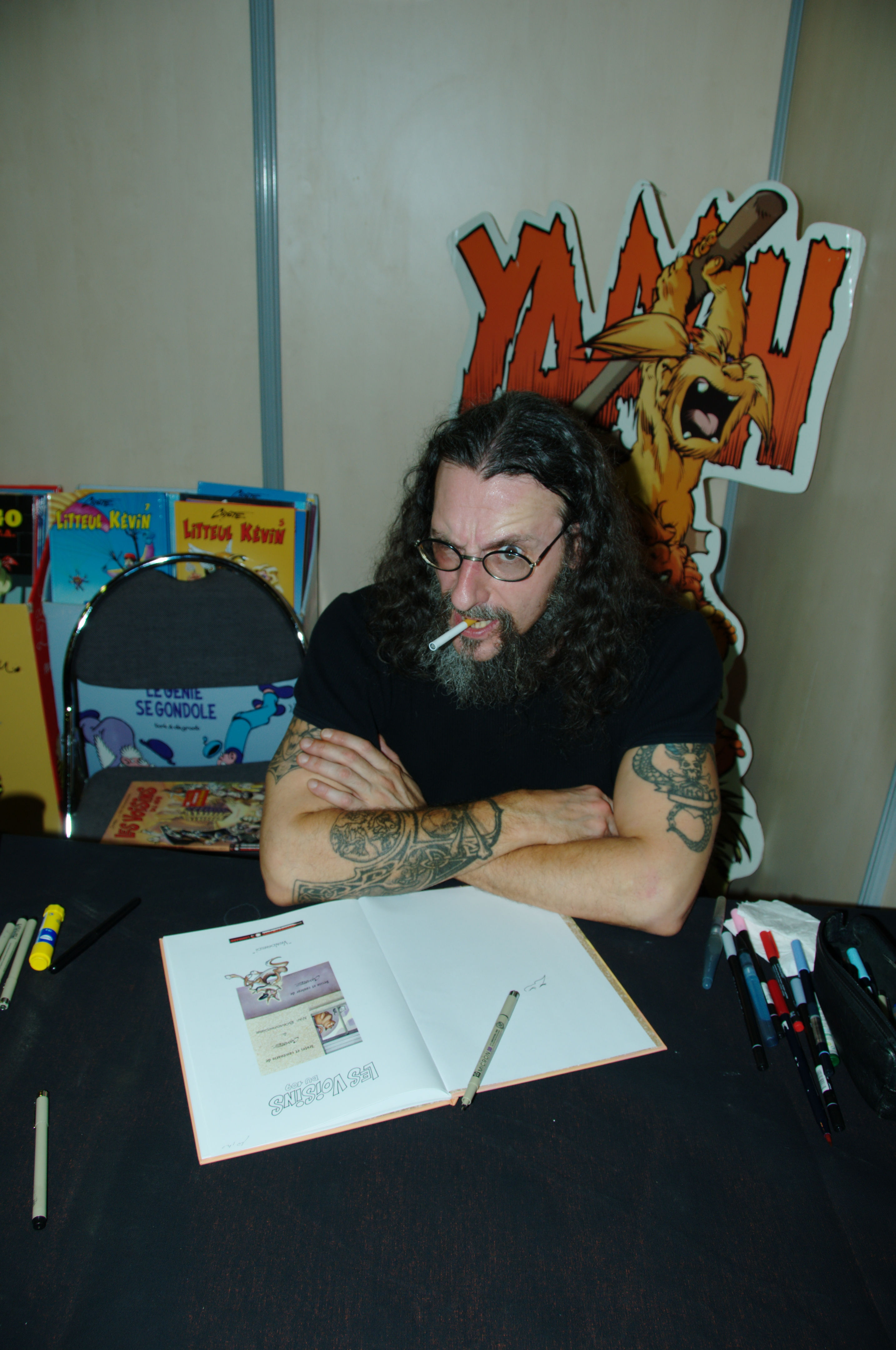 Coyote au festival de Bande dessiné de Mandelieu.